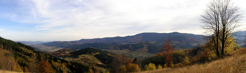 Masyw Policy z widziany z Kiczory na szlaku czerwonym do Suchej Beskidzkiej